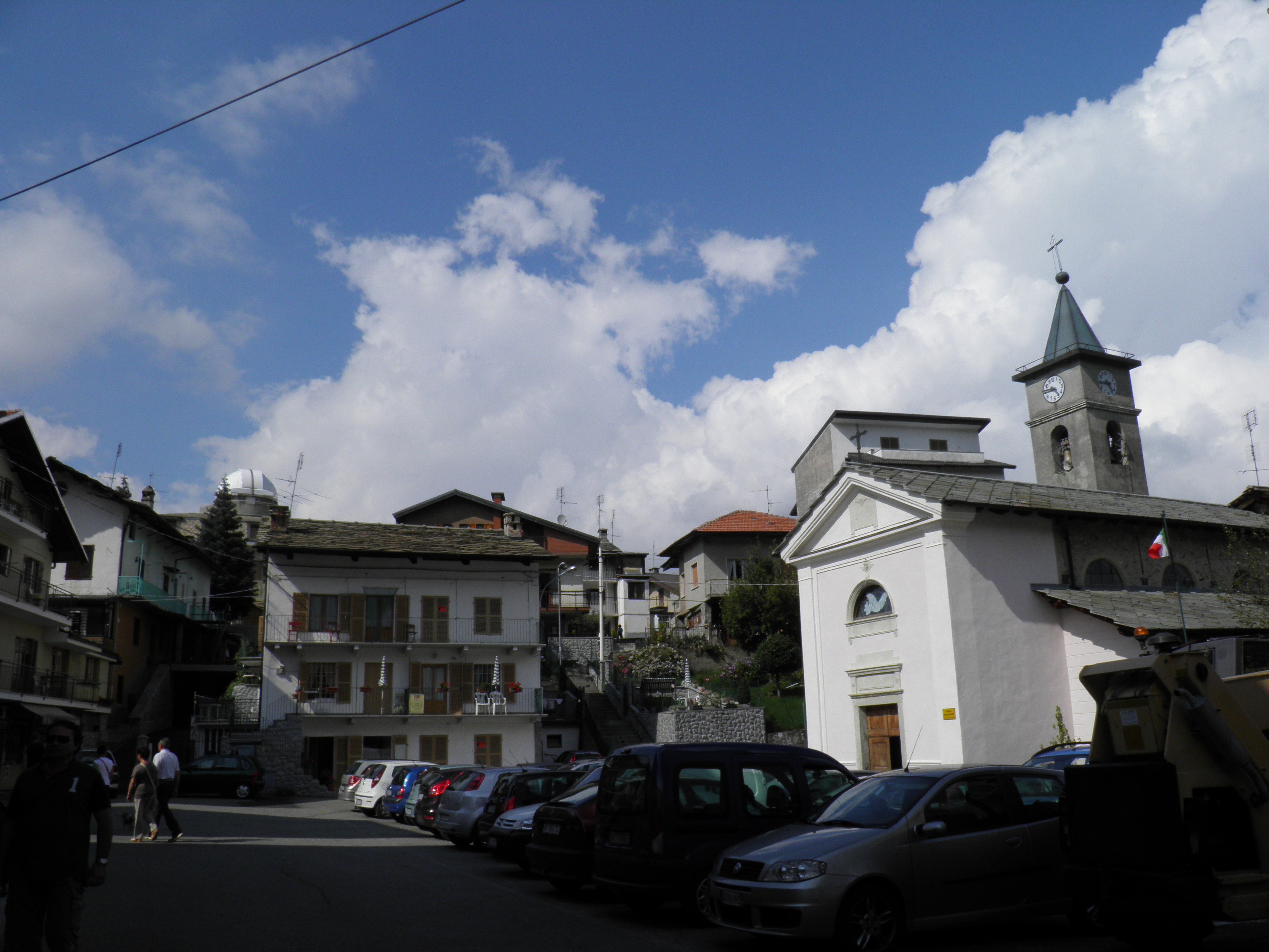 Vista della Piazza Goglio Battista con la Parrocchiale "SS. Pietro e Paolo".